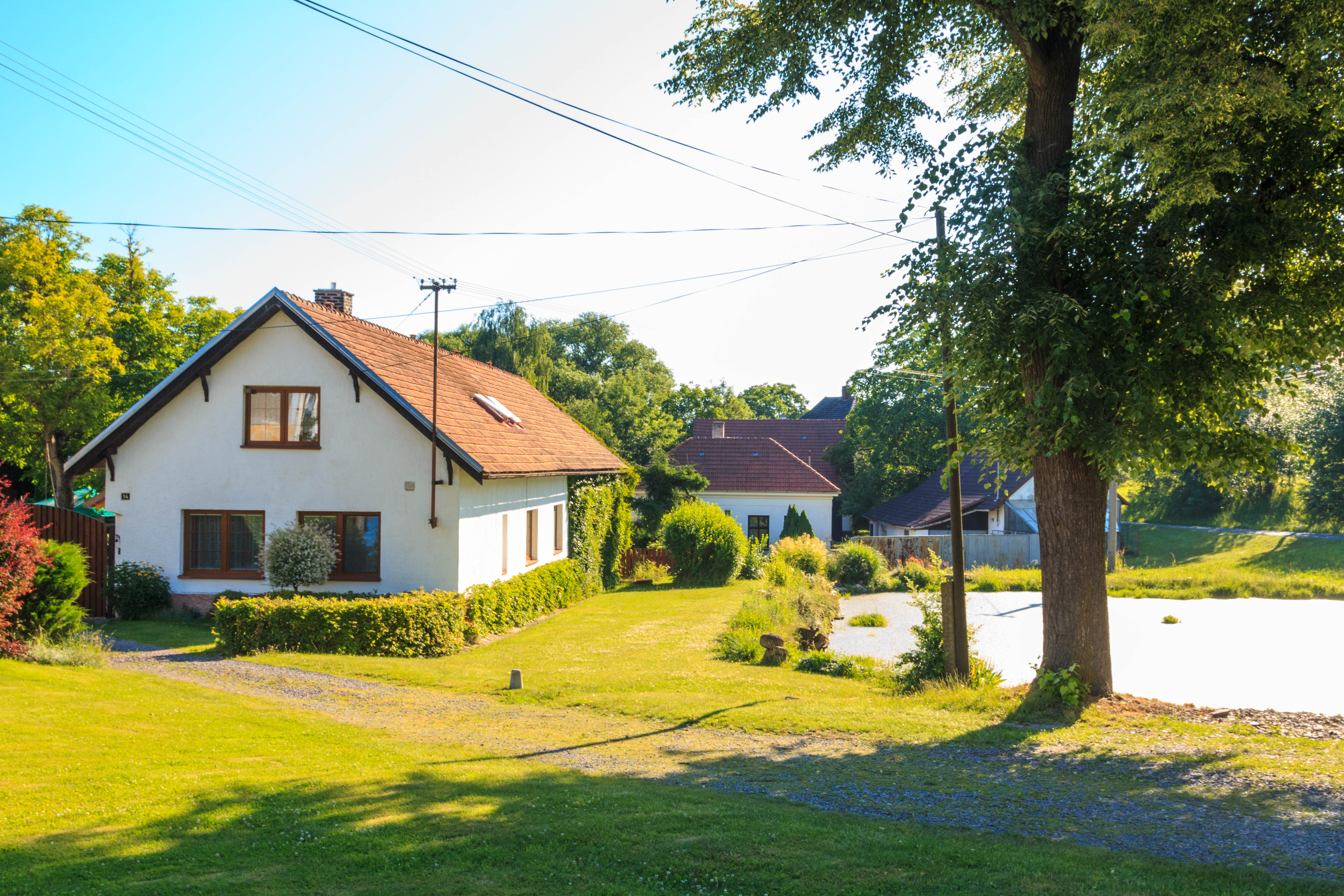 Nasavrky čp. 14